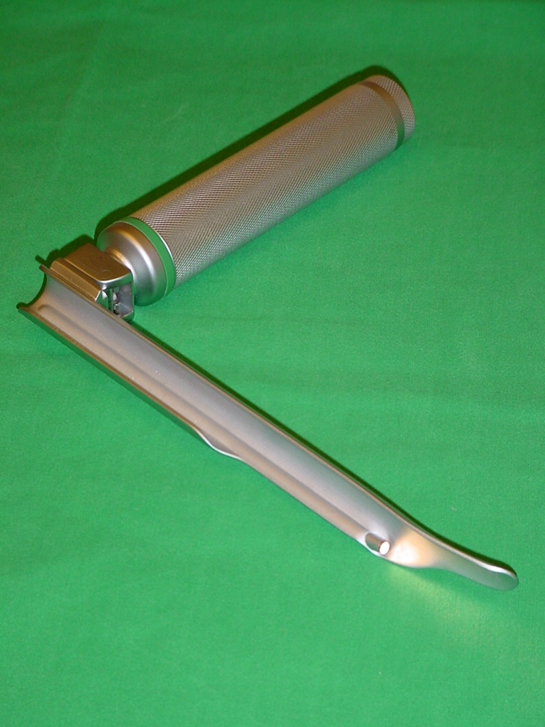 Laryngoskop, Miller-Spatel, Kaltlicht.